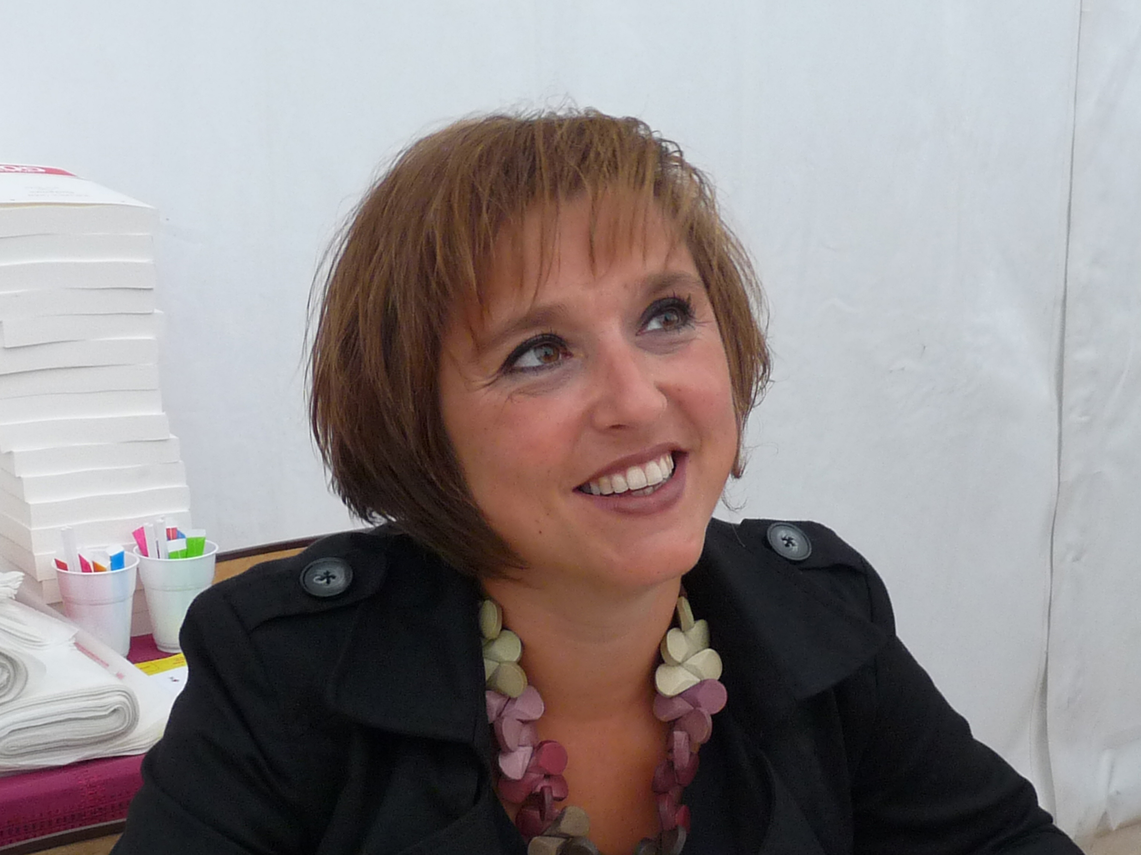 Valentine Goby en dédicace dans le cadre du "Livre sur la Place", Nancy, septembre 2011